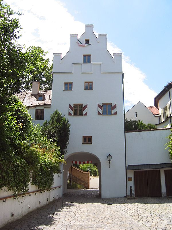 Freising, Domtor (1479)